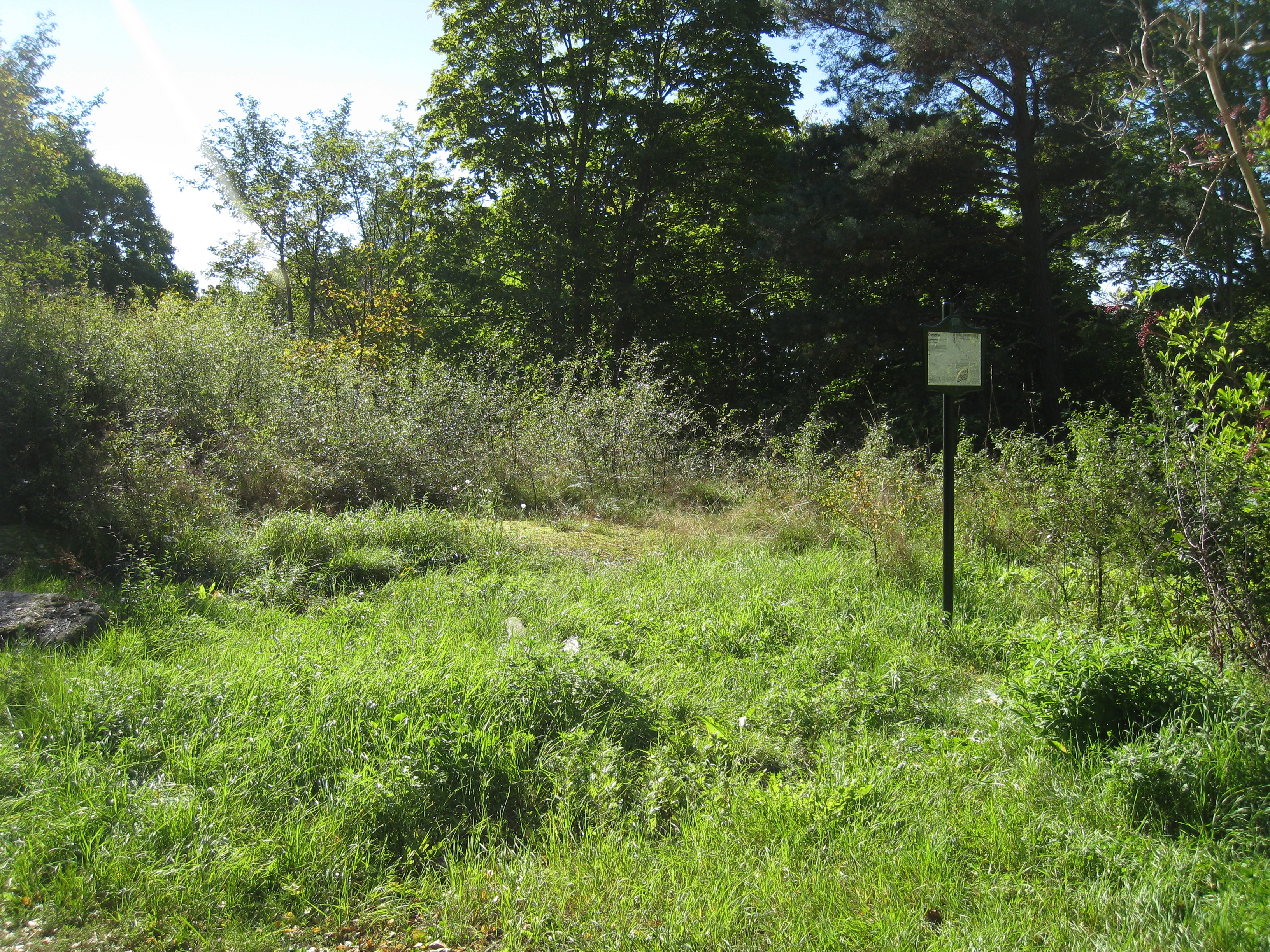 Komötet, yngre järnåldersgravfält i Norra Ängby i Bromma, väster om Stockholm. Skylten är rest på gravfältet strax intill Liljegrensvägen.